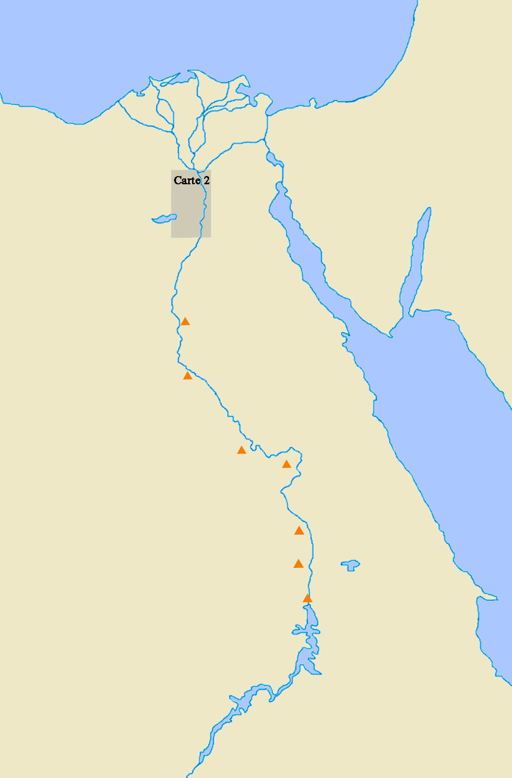 Positions des pyramides égyptiennes (Carte 1)